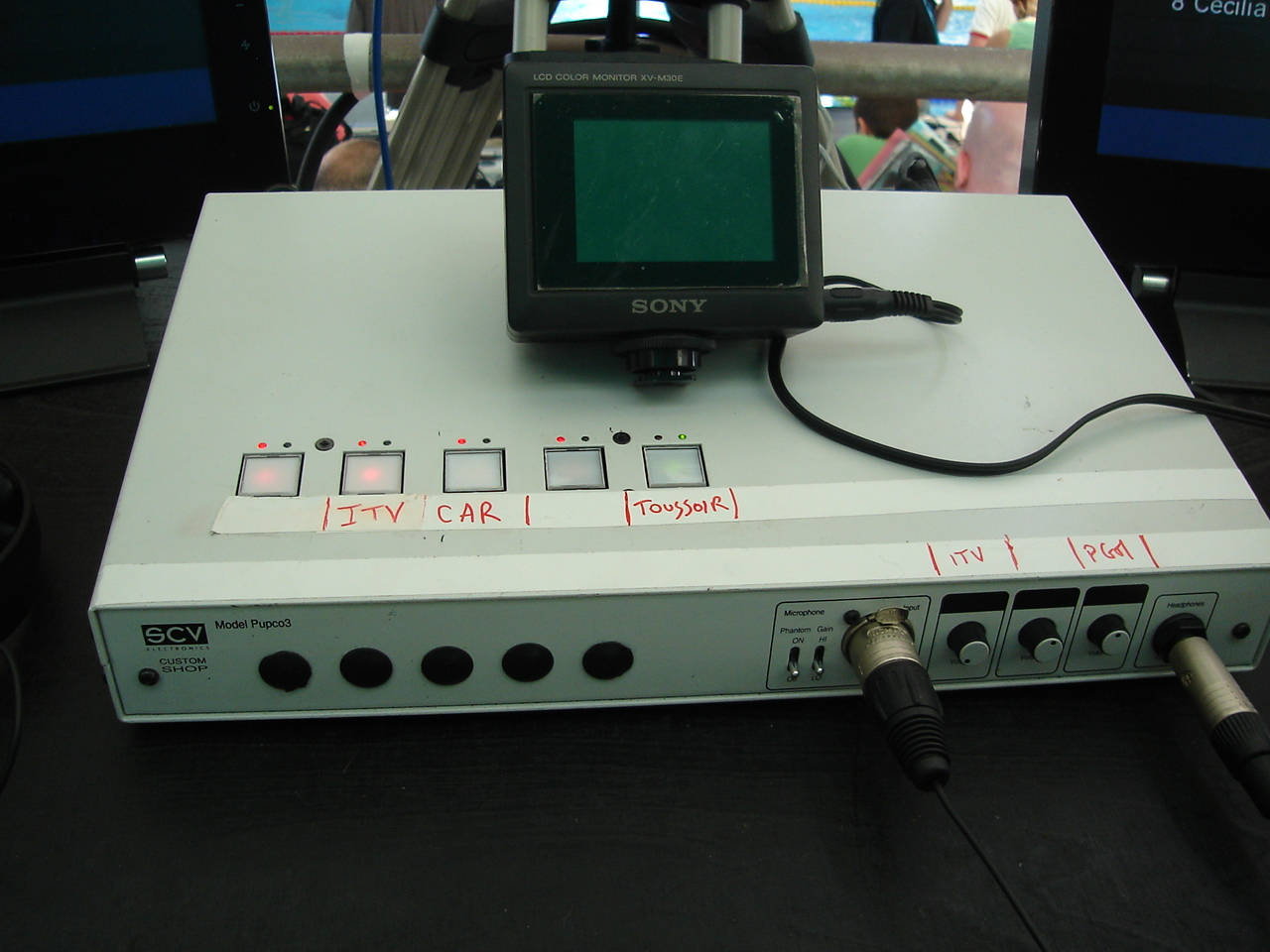 Pupitre commentateur SCV Electronics